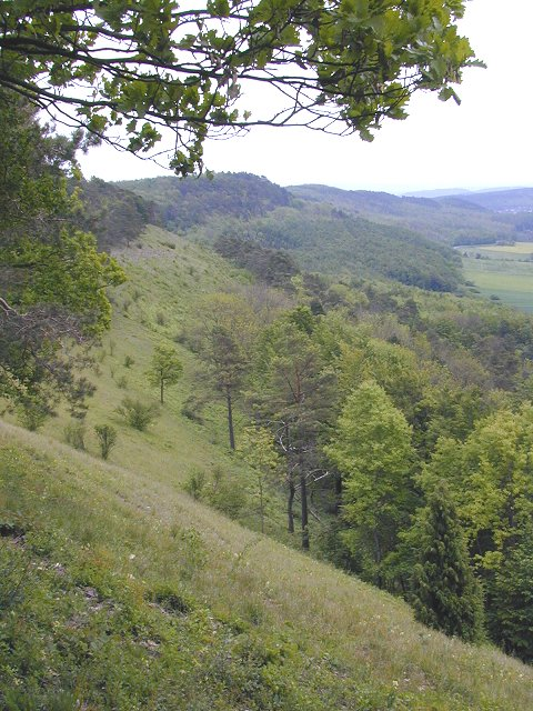 Westhang der Weper (im Vordergrund die Trockenrasen des Naturschutzgebietes)